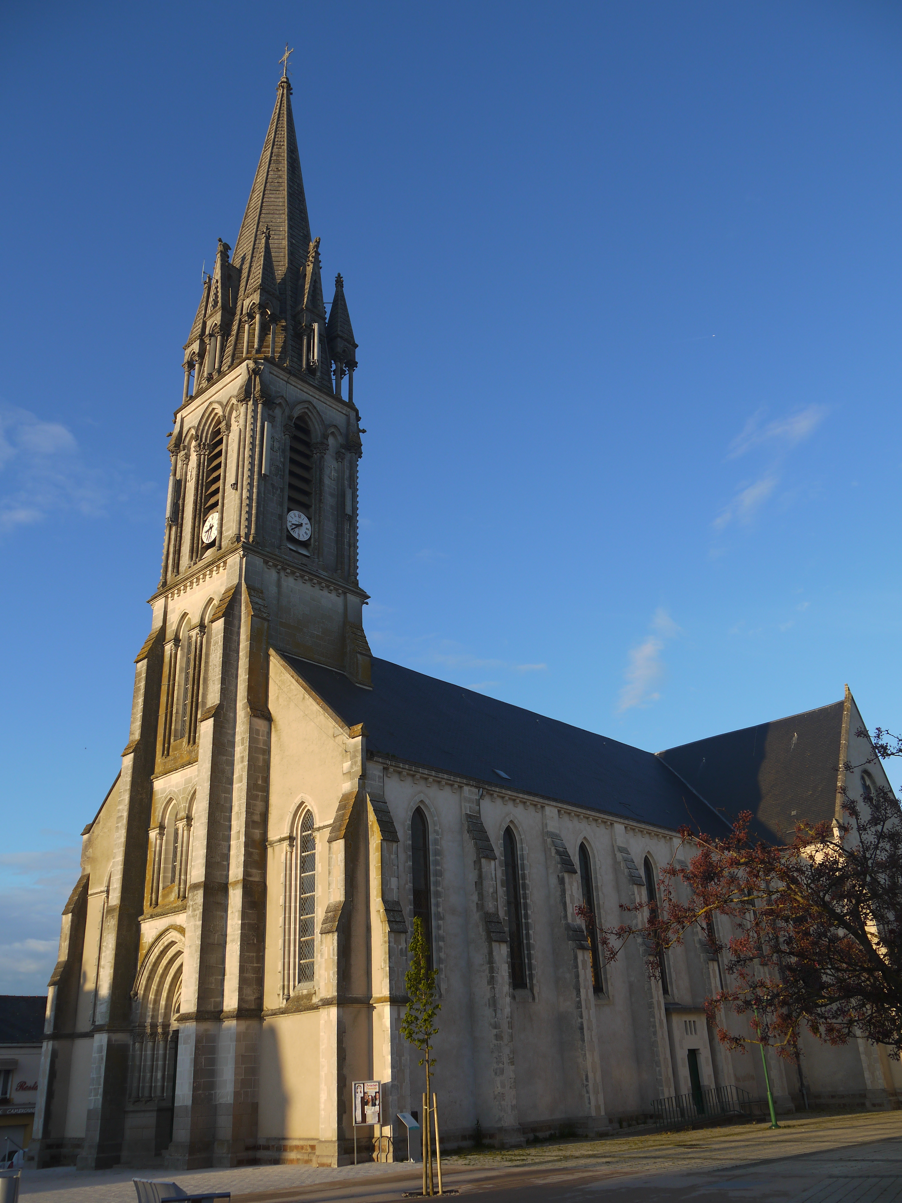 Vue générale de l'église Saint Sébastien de la paroisse Saint Sébastien sur Loire 44230